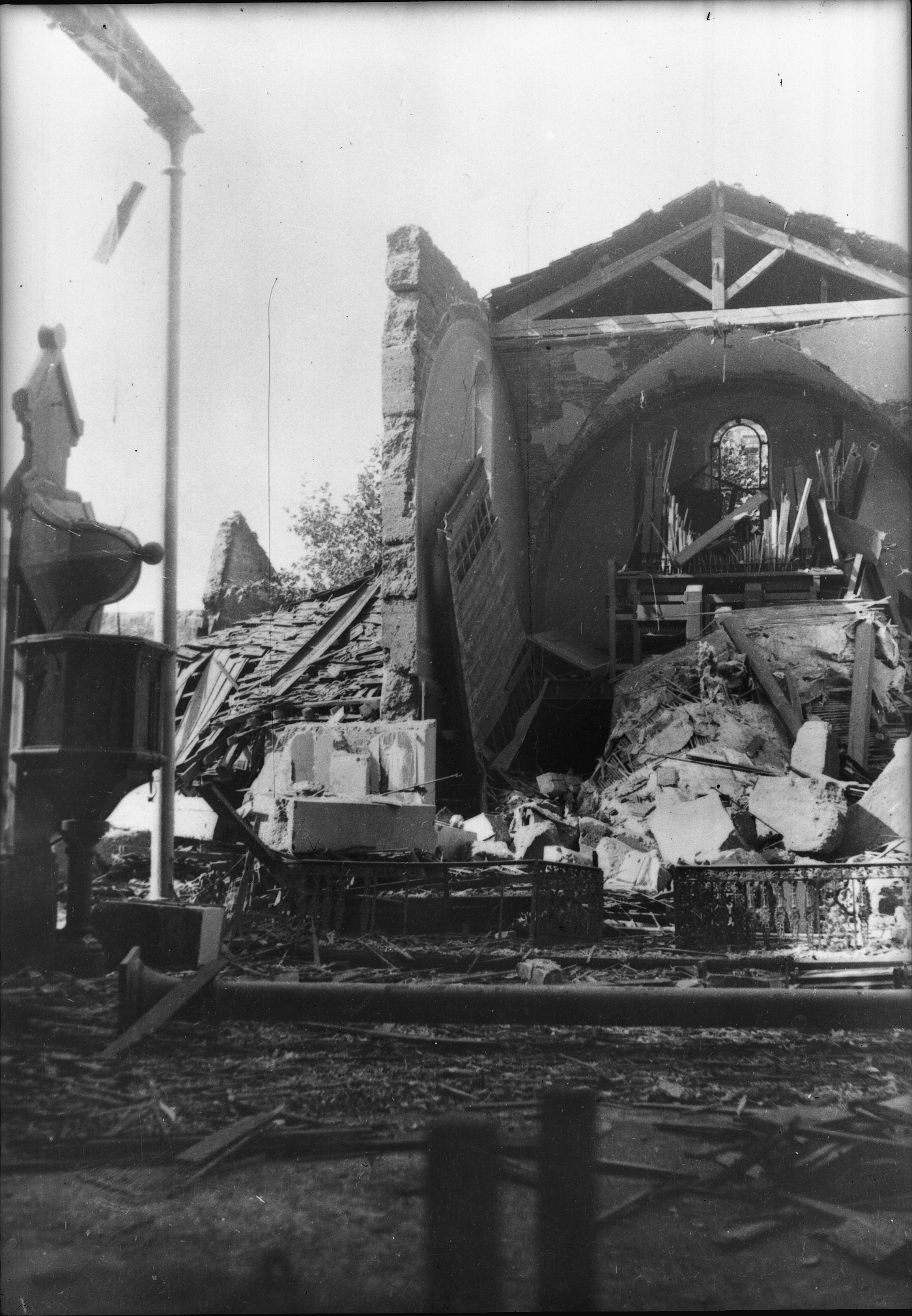 Église (voûte et vitrail) détruite en 1944 par un bombardement